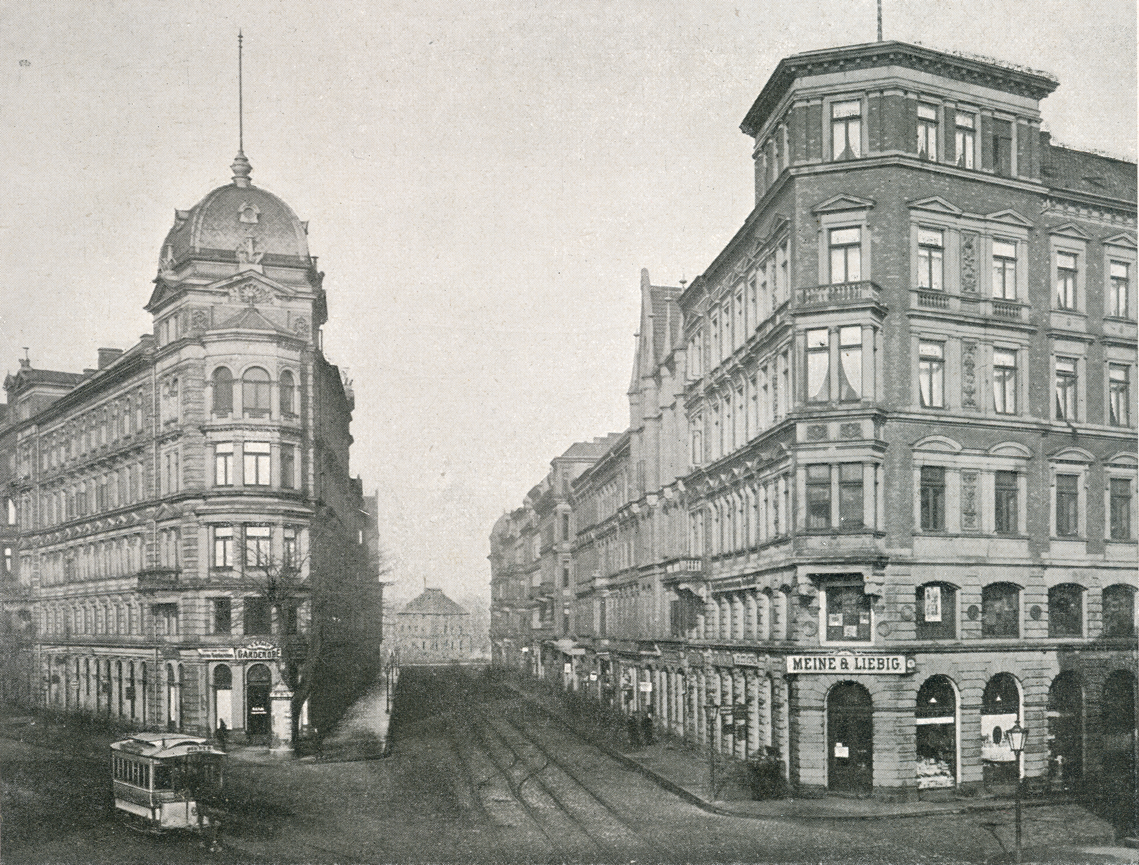 Blick vom Steintor durch die Nordmannstraße in Richtung des St. Nikolaistiftes. Rechts ist das Eckhaus Kanalstraße 11 zu sehen, das mittig Zugang zu dem Backpulver- und Puddingpulver-Fabrikanten Meine & LIebig gewährt. Nach links führt die Georgstraße weiter in Richtung Goethestraße, aus der eine Pferdebahn der späteren hannoverschen Straßenbahn (Üstra herausfährt. Die um 1890 aufgenommen Szene wirkt nur aufgrund ihrer sehr langen Belichtungszeit für das Foto so unbelebt, weil sich die meisten Menschen und Objekte schneller bewegten und daher wie unsichtbar wirkten ...